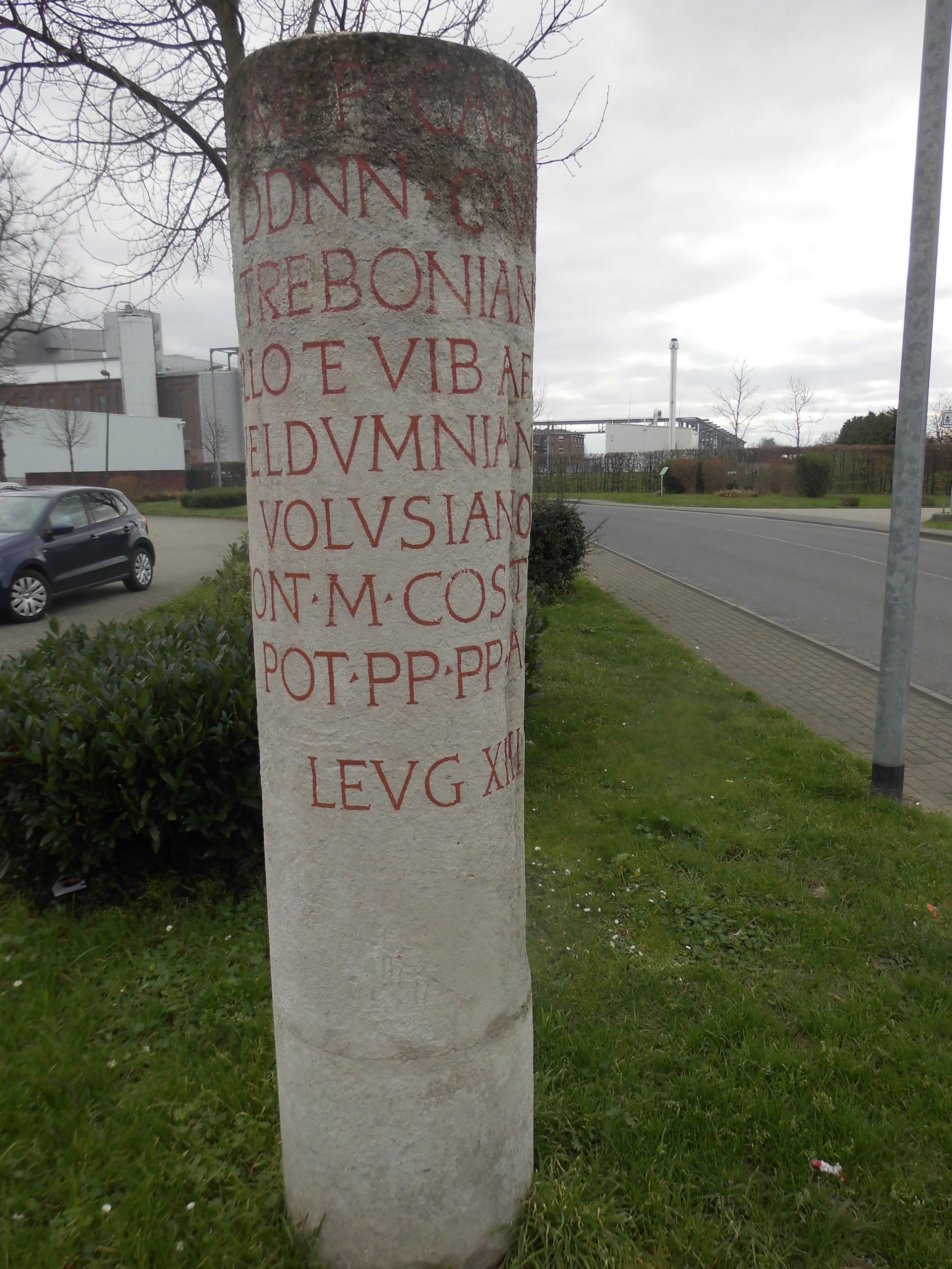 Moderne hypothetische rekonstruktion einer Meilenstein an der Köln-Aachener-Straße (AE 1997, 01148)